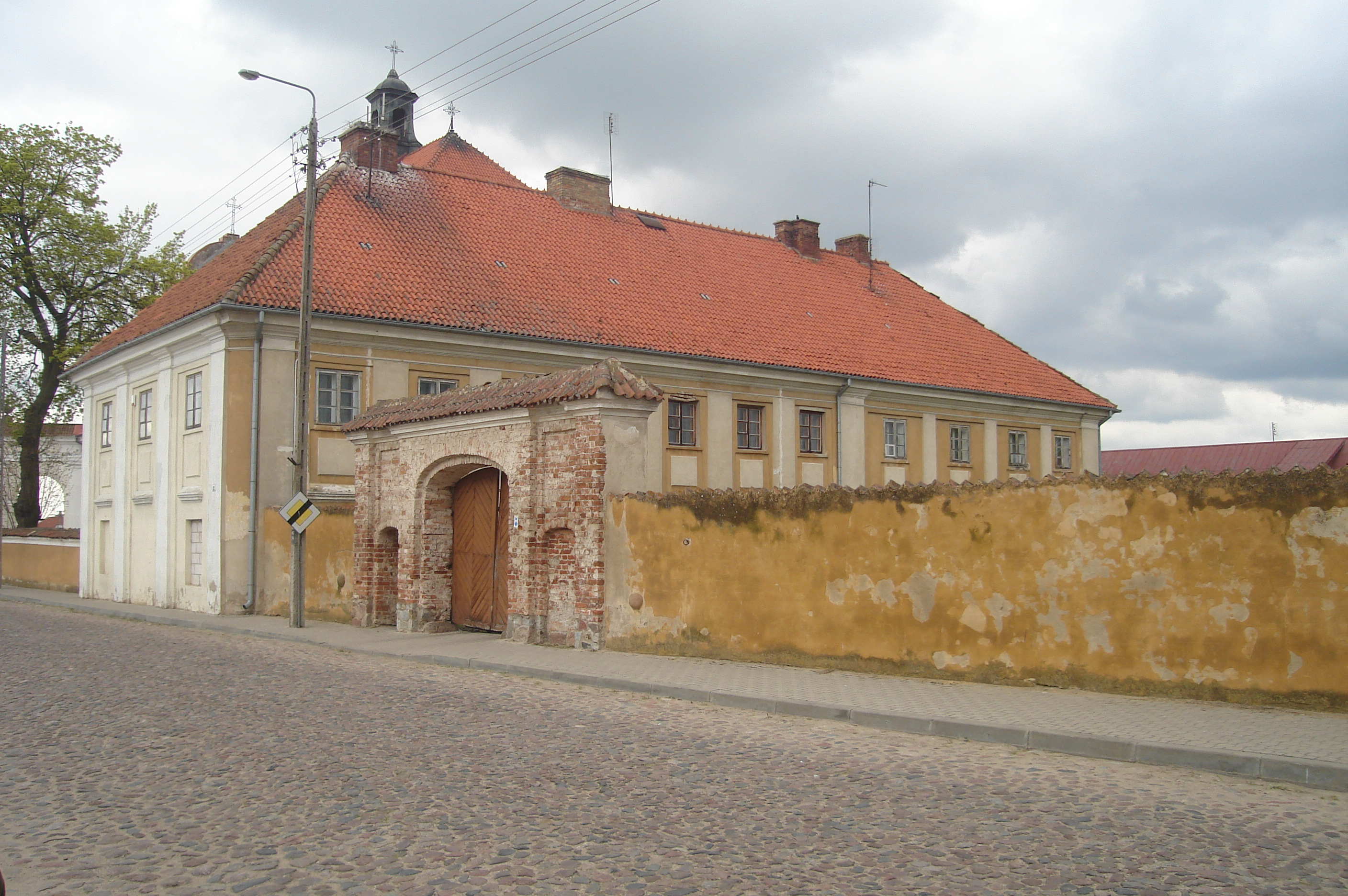 Tykocin, ul. 11 Listopada - brama (przy plebanii) w zespole klasztornym misjonarzy 5.1958.